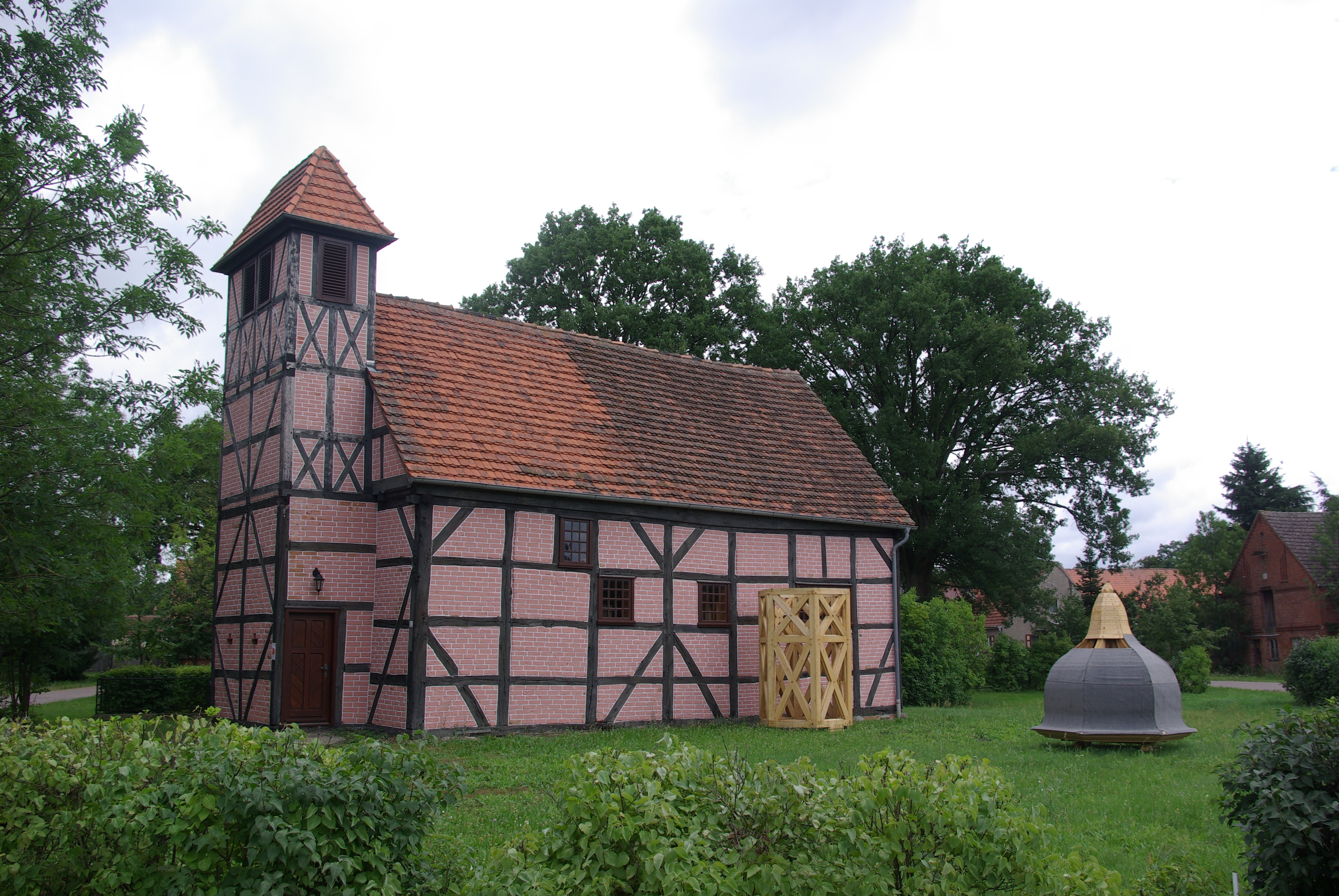 Legde/Quitzöbel in Brandenburg. Die Kirche im Ortsteil Roddan steht unter Denkmalschutz. Die Kirche wurde um 1680 erbaut.